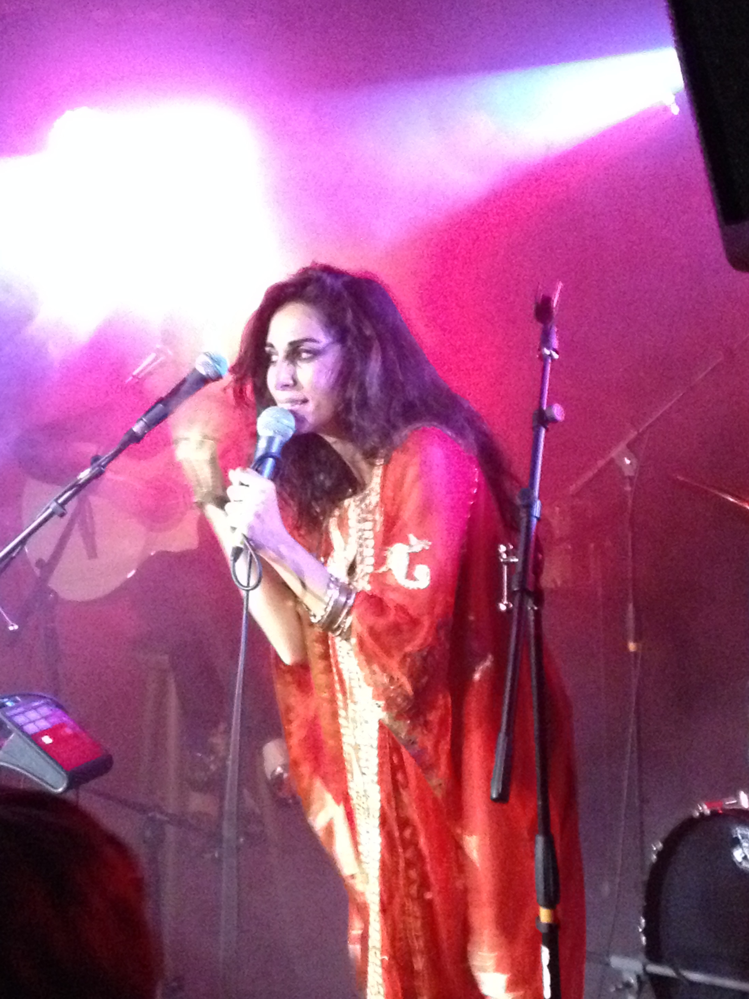 Yasmine Hamdan in Berlin, Privatclub